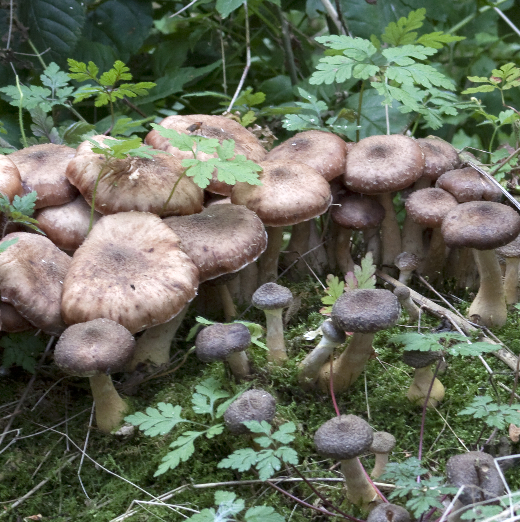 Fungi 2